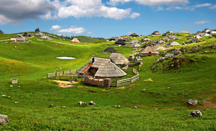 Več fotografij in zemljevid v knjigi: Velika planina